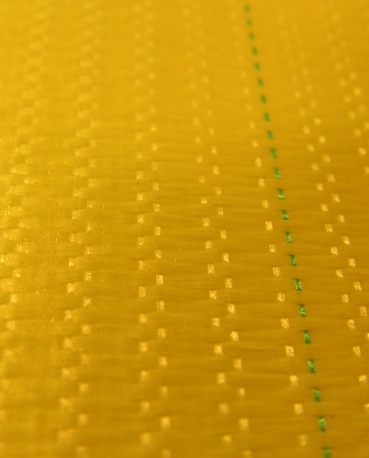 Tissage de fibres d'aramide.